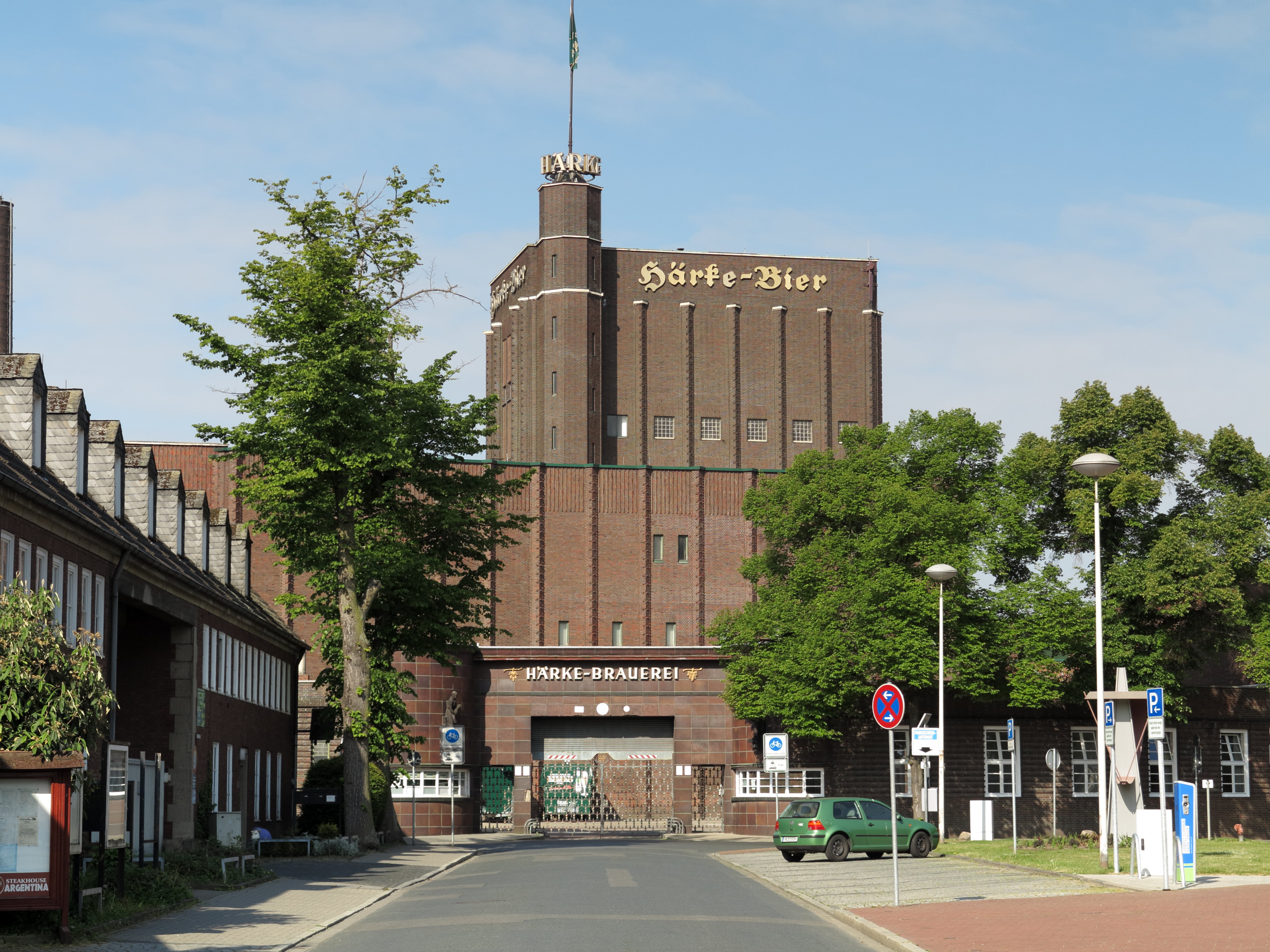 Peine: die Braumanufakrur Härke